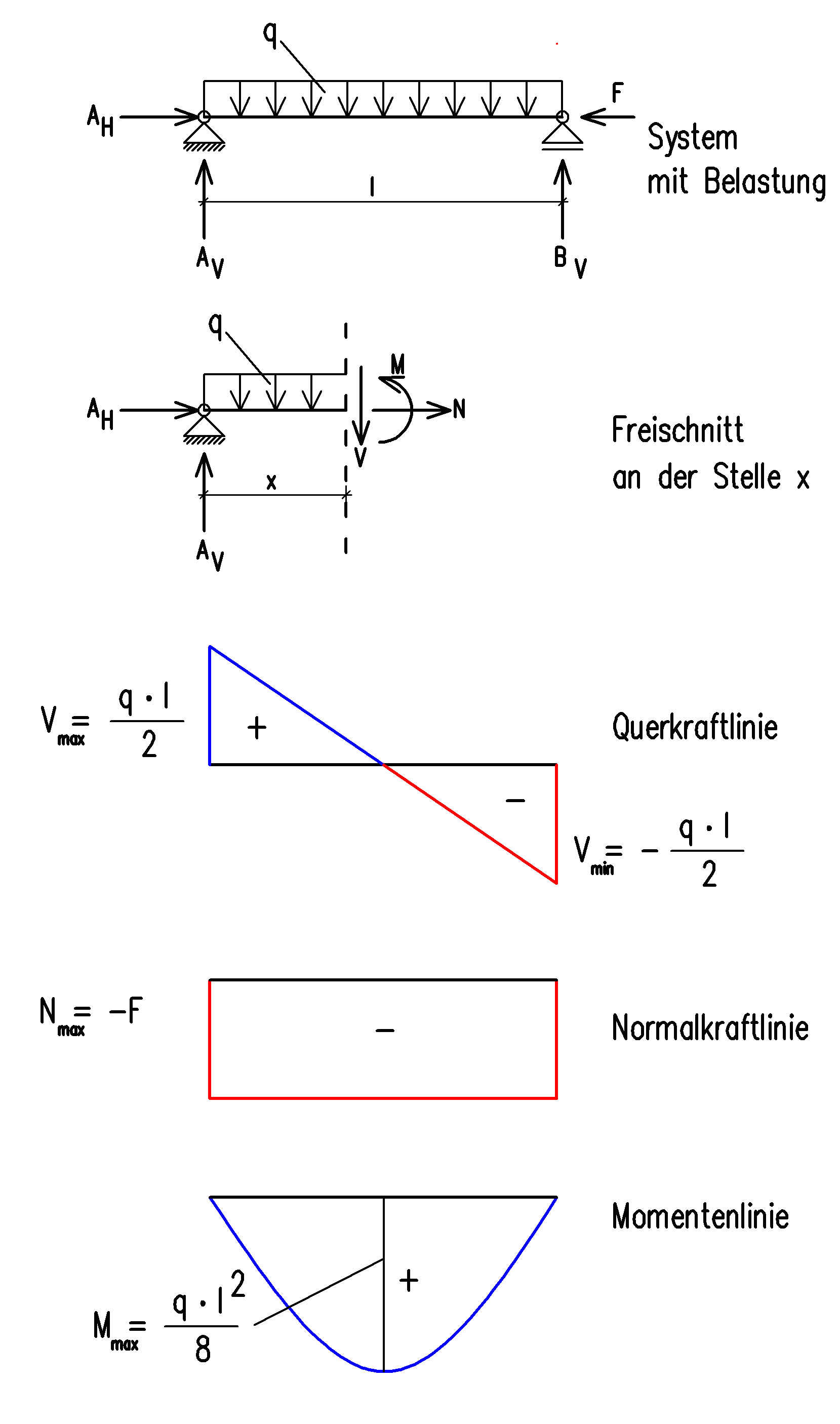 Einfeldbalken